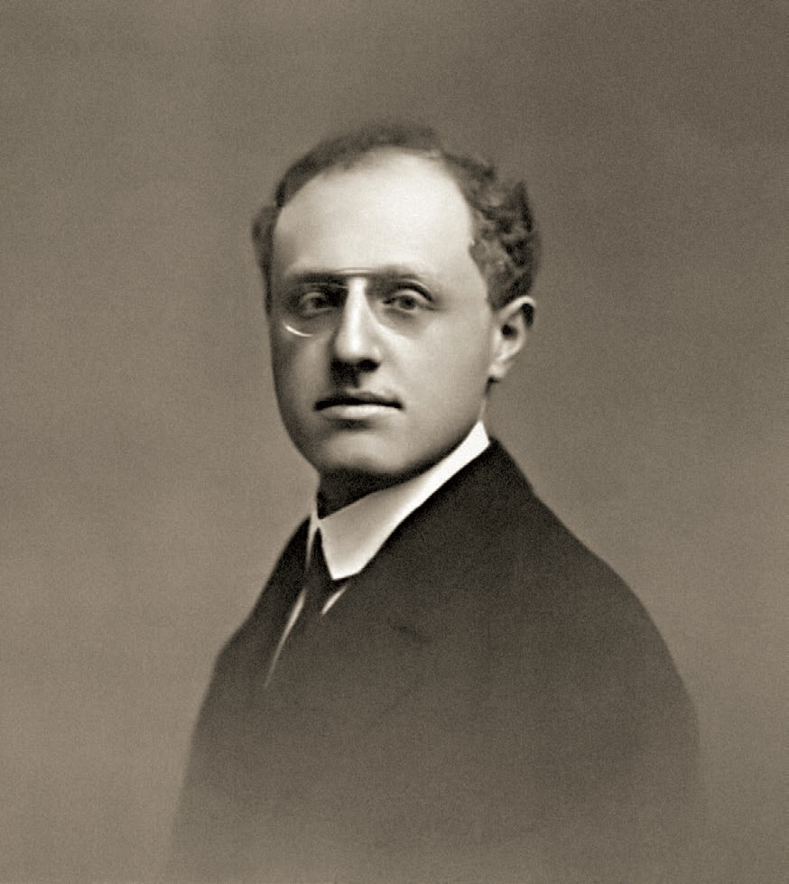 Ritratto di Angelo Sullam.